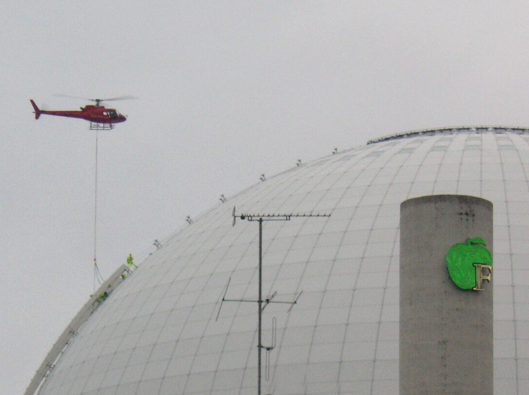 Montage av gondolbana på Globen i Stockholm